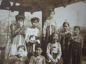 이화학당 소학부 시절의 김활란